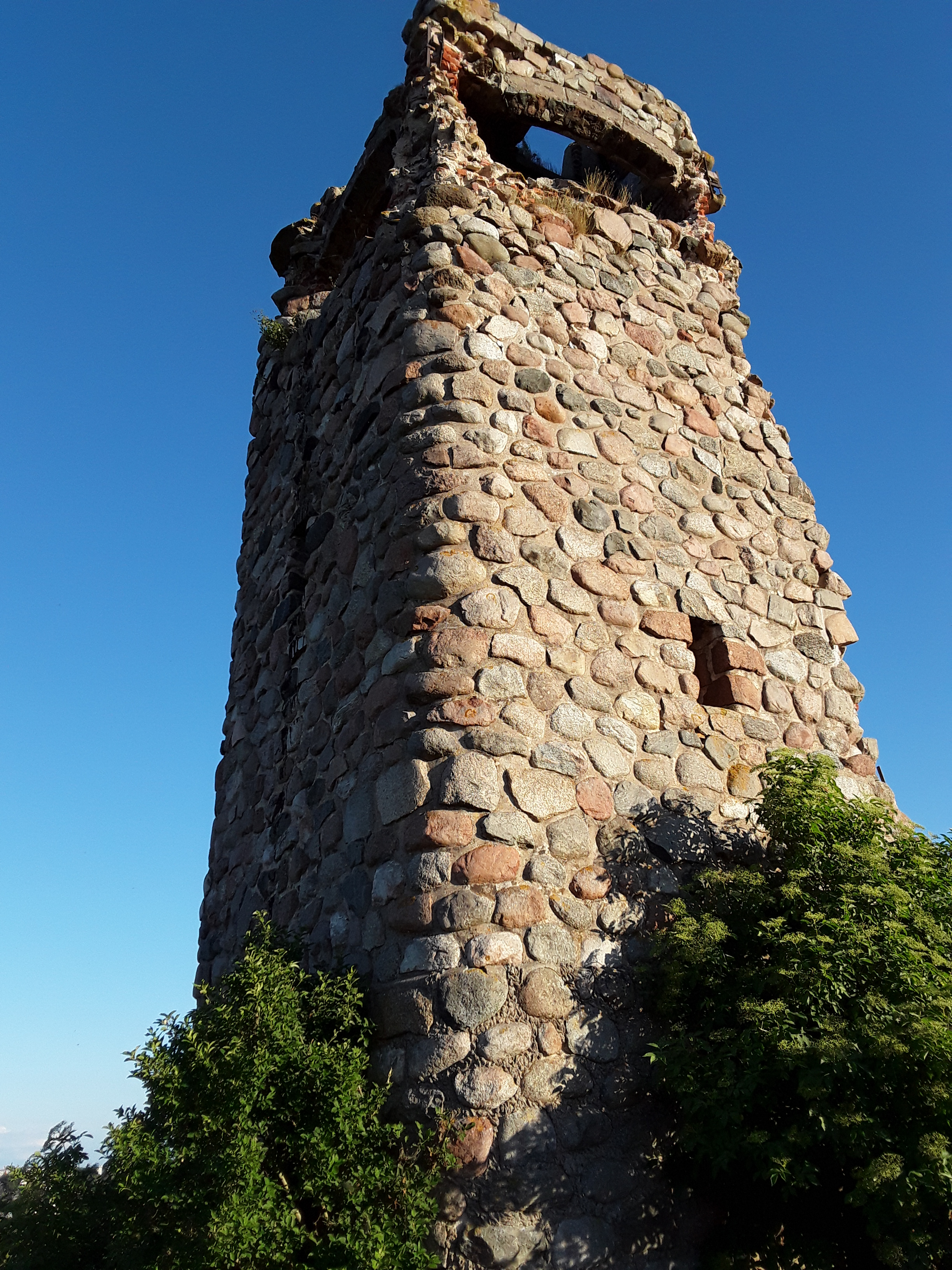 Bismarckturm unweit von Insterburg, wenige Tage vor dessen Einsturz